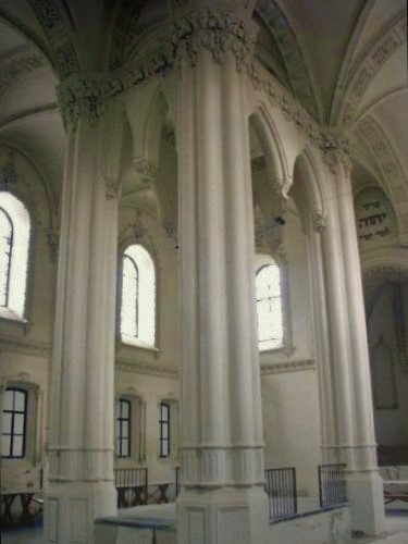 Главная синагога Гродно